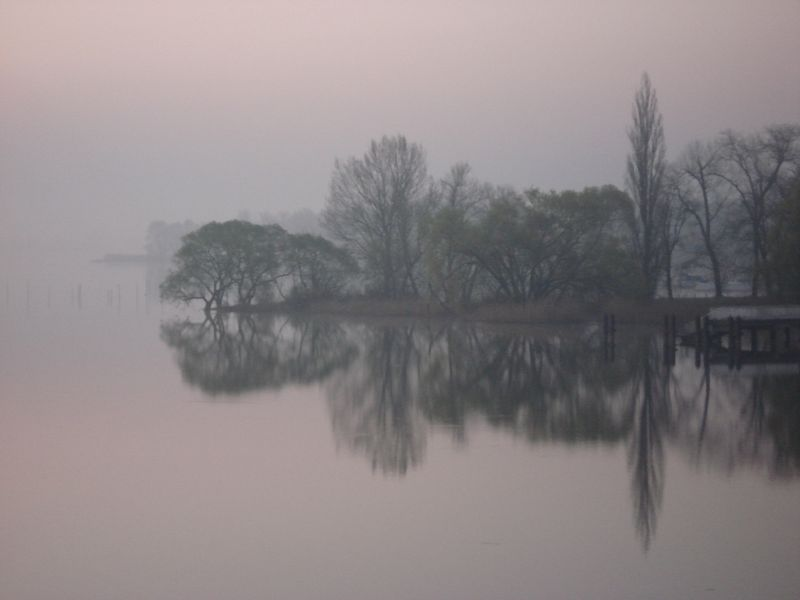 Das Kirchmöseraner Ufer des Plauer Sees